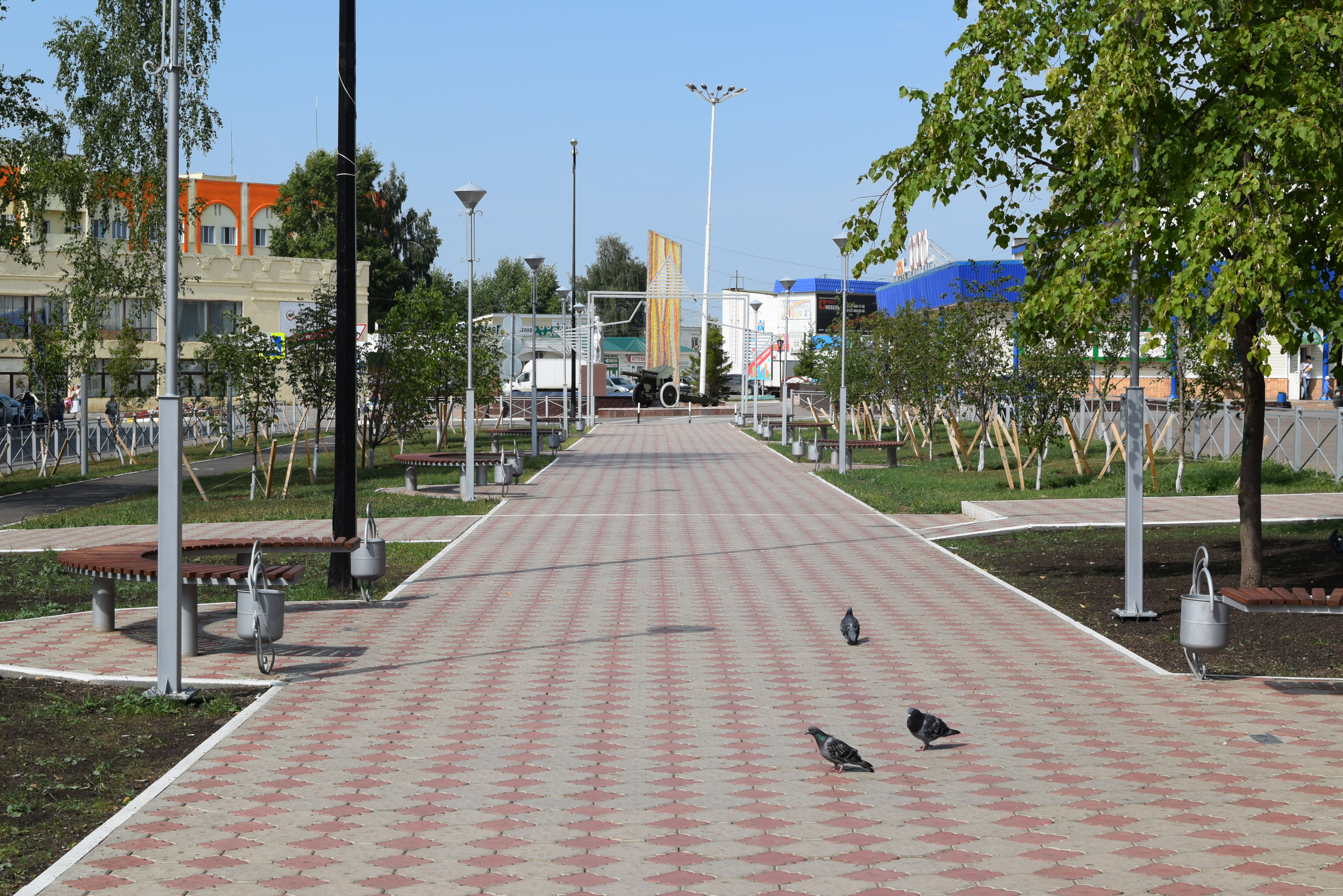 Менделеевск Аллея Героев